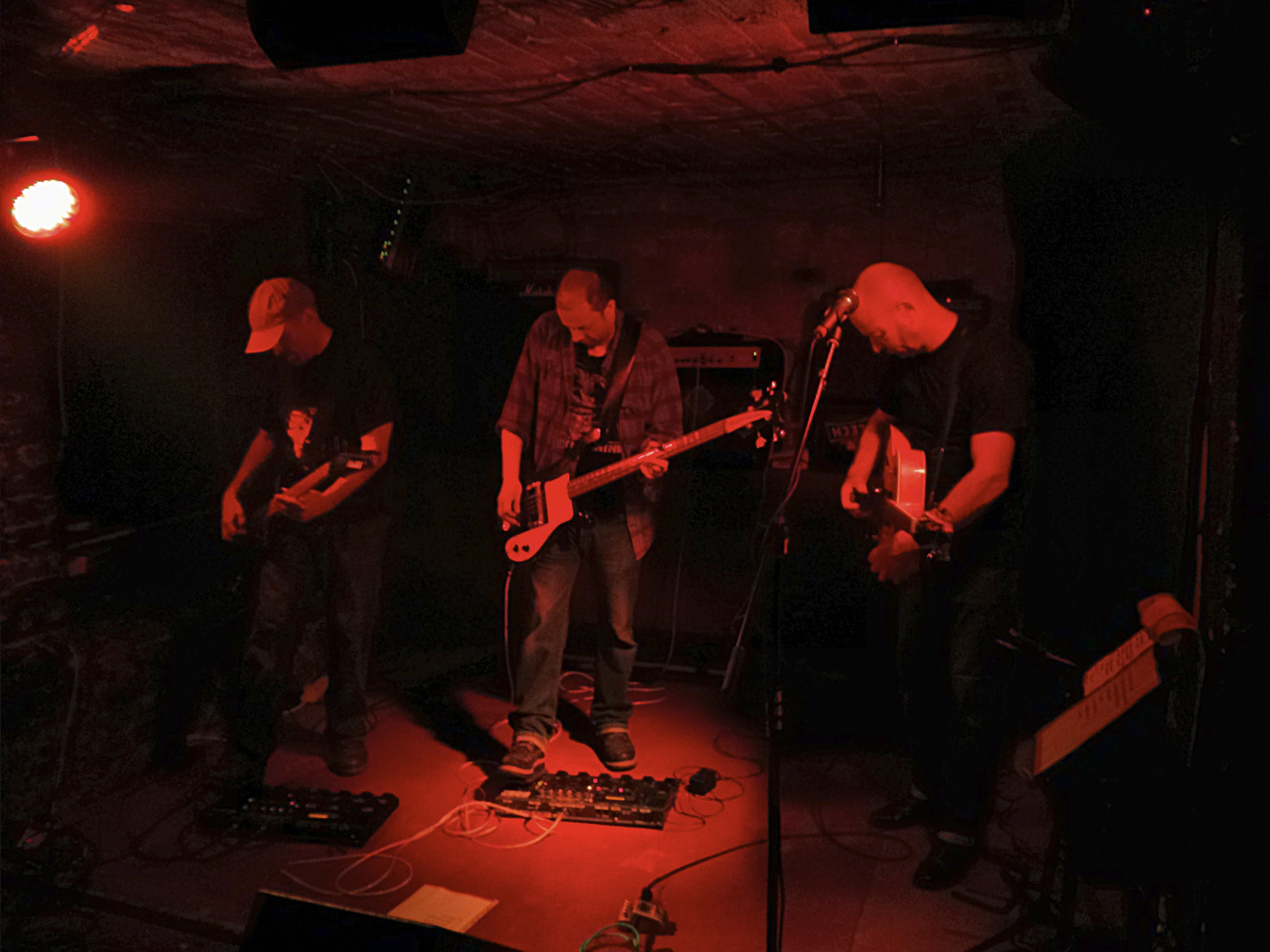 Iroha, live in Berlin